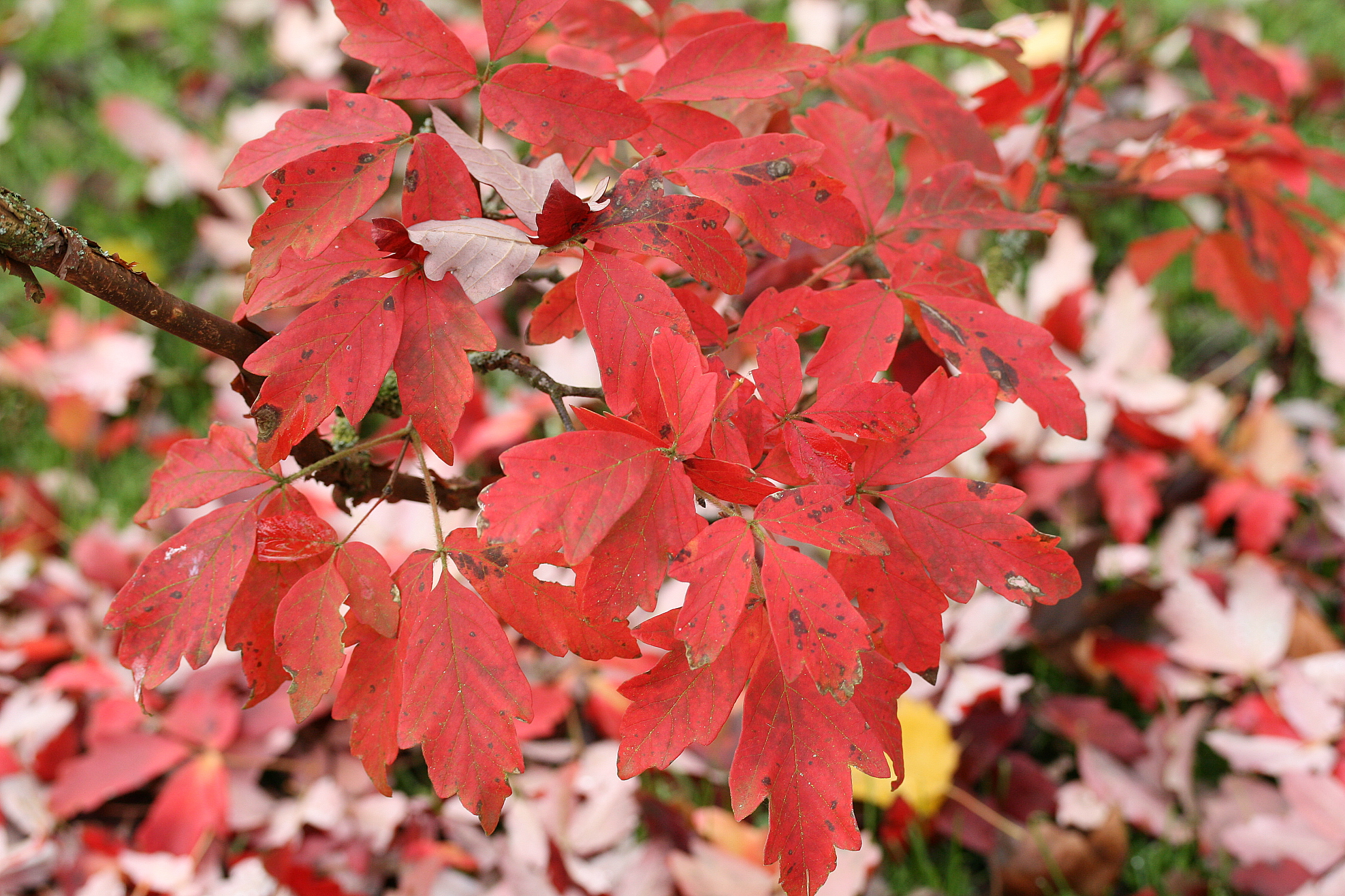 Érable à écorce de papier ou écorce canelle (Acer griseum).